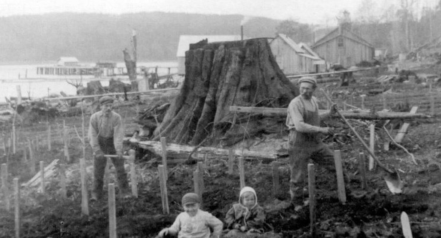 Коммуна «Сойнтула».